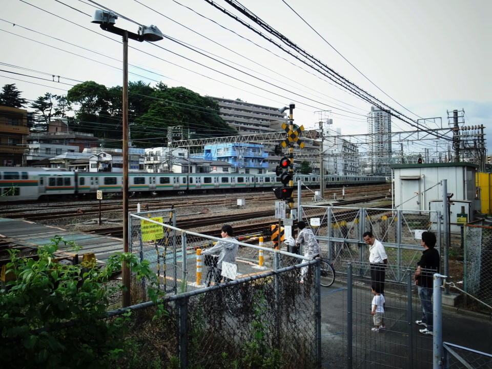 花月園前駅